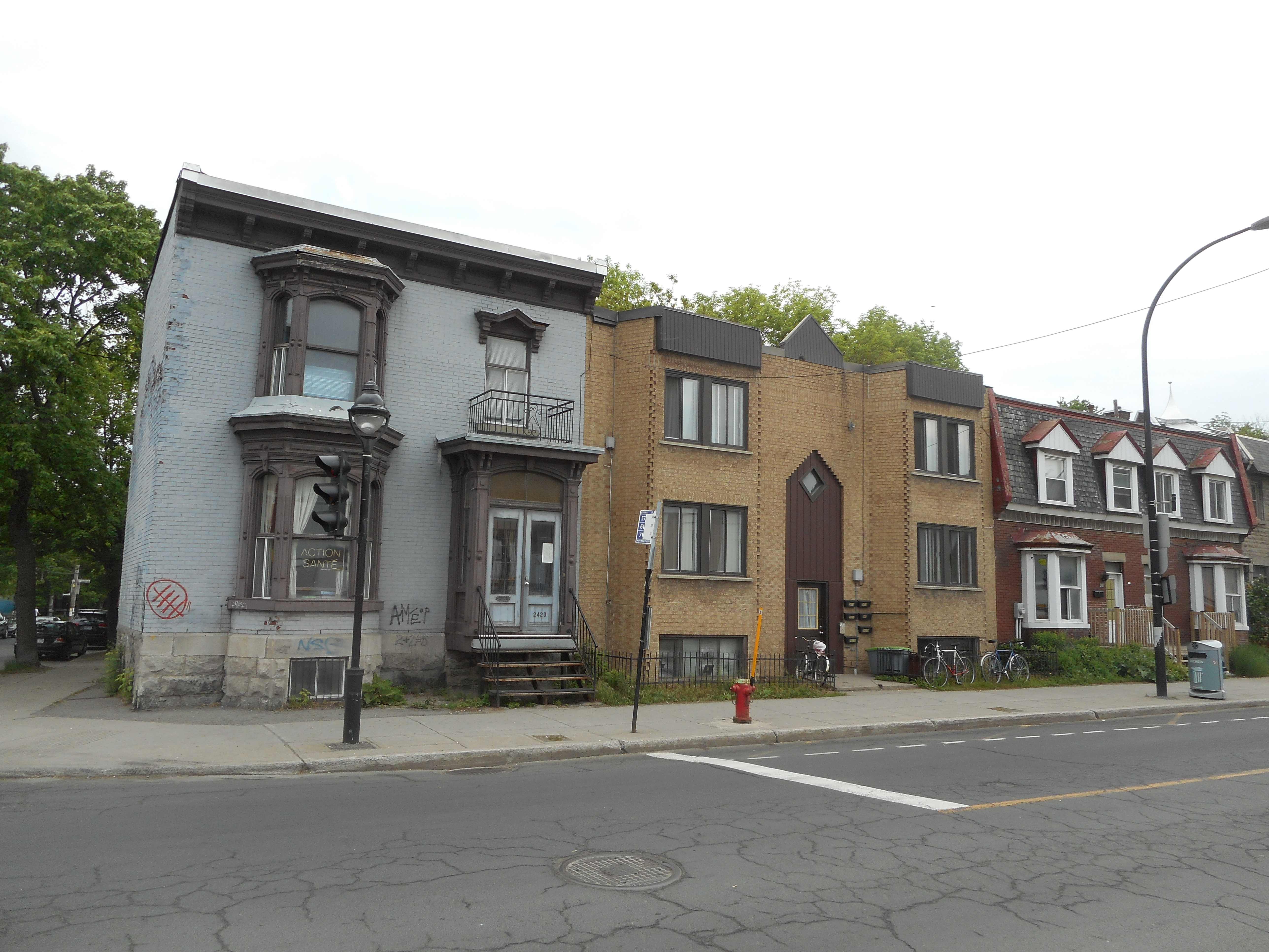 2423 rue Wellington / rue Charlevoix, quartier Pointe Saint-Charles, Montréal